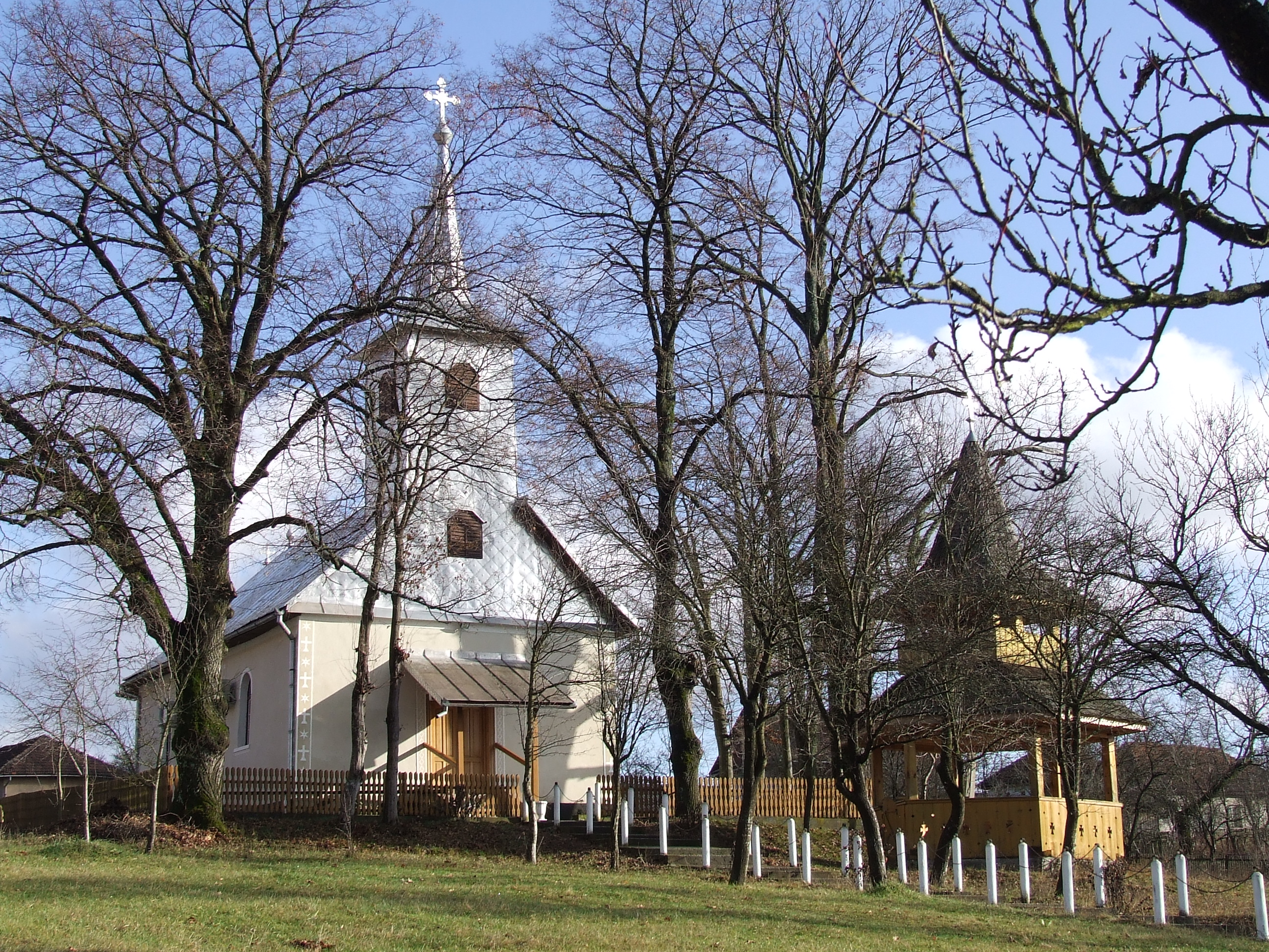 Biserica de lemn din Sălişte, judeţul Maramureş.